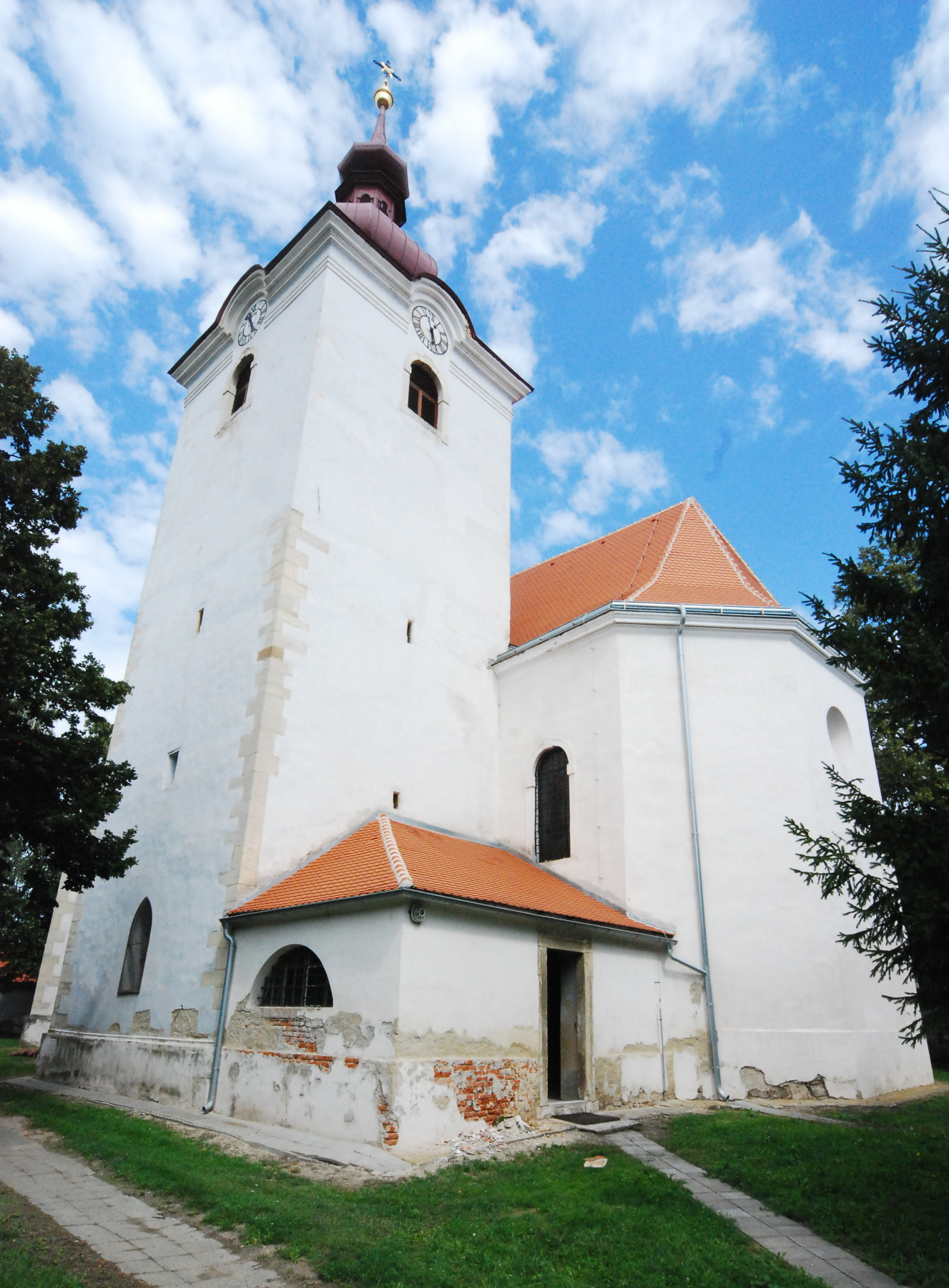 Kirche von Slup bei Znojmo in der Tschechischen Republik